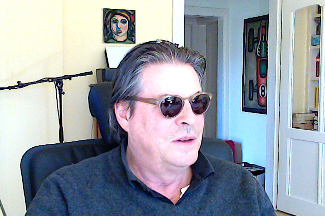 Zuhause